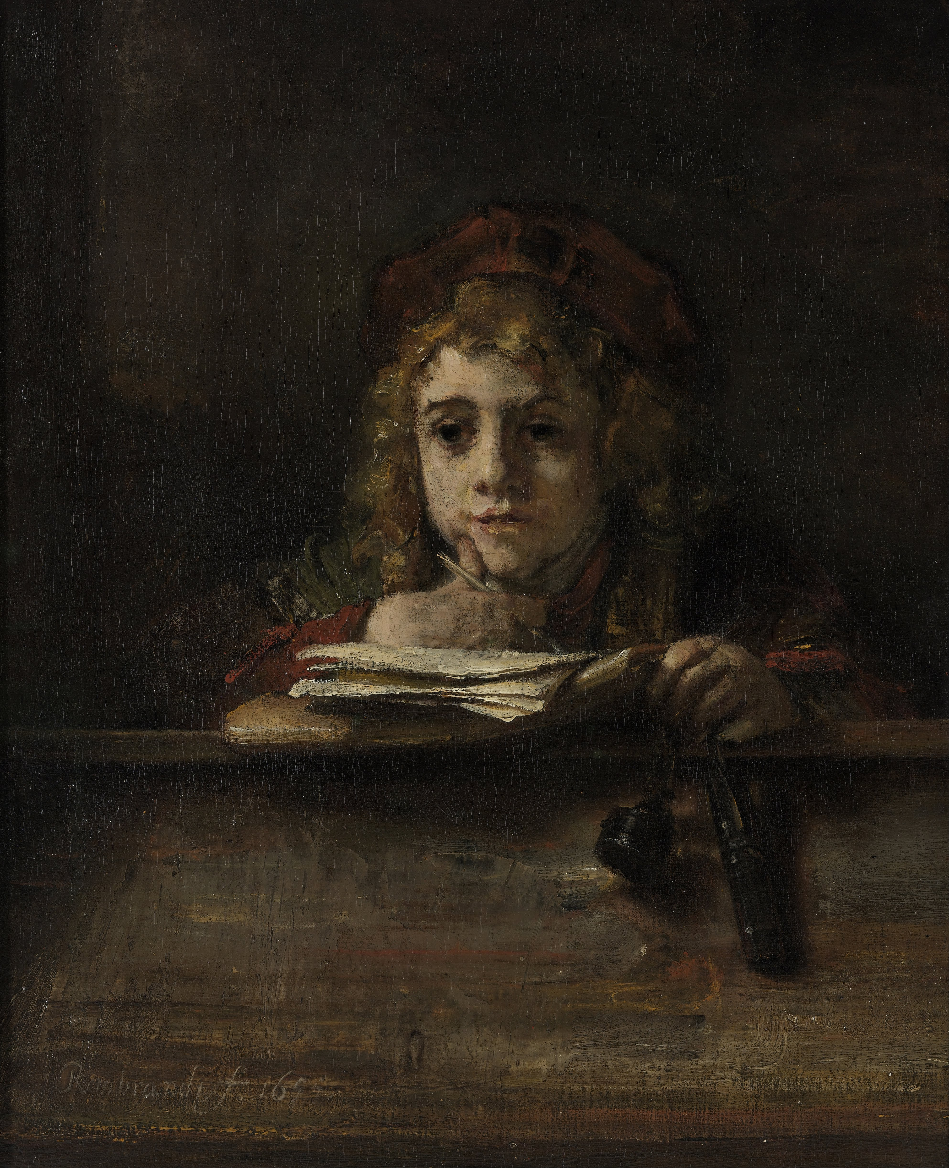 Portrait of Titus van Rijn (1641-1668), Rembrandt's son with Saskia van Uylenburgh.